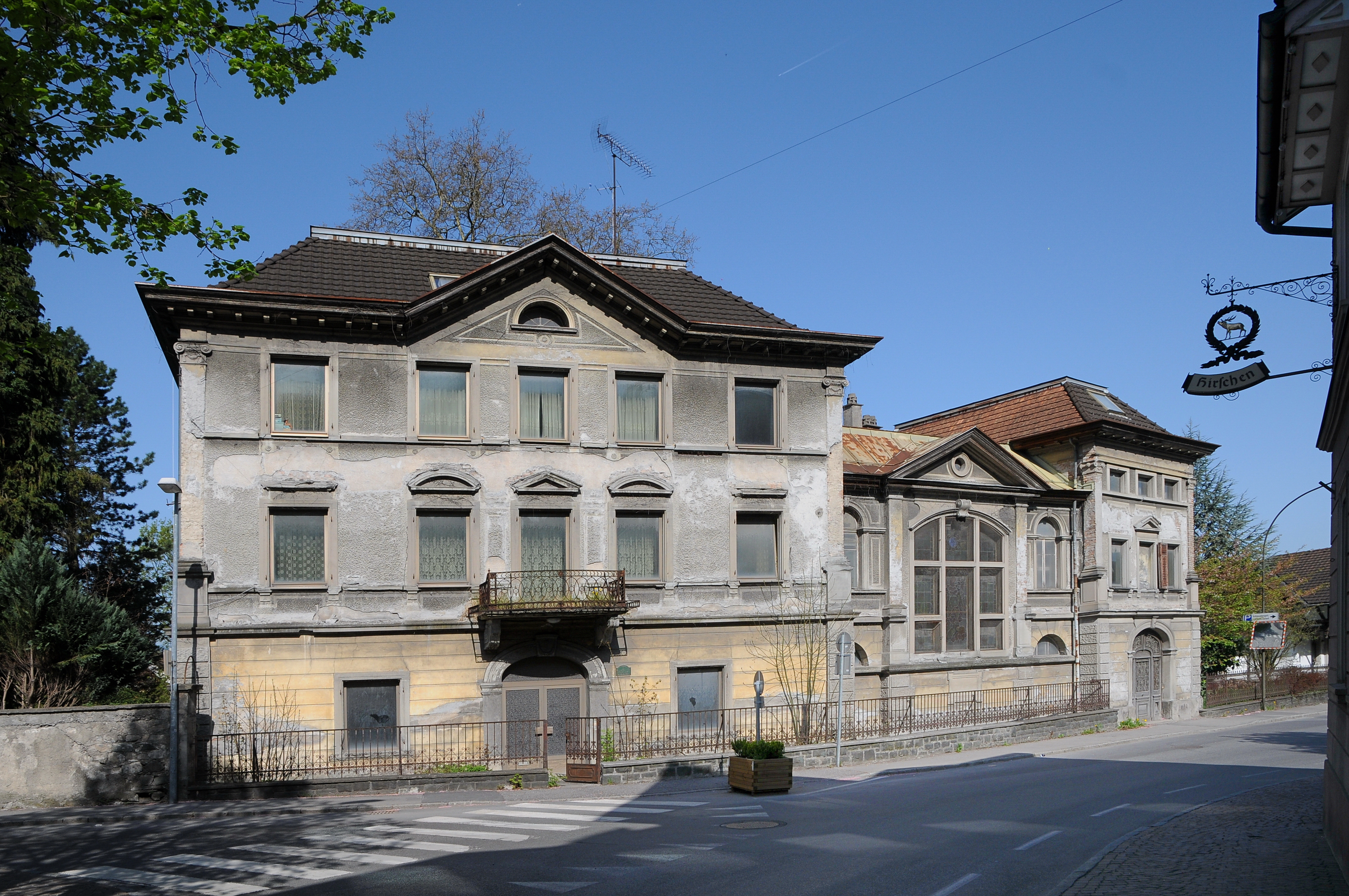 aus dem DEHIO Vorarlberg 1983: Radetzkystrasse Nr.1 “Villa Iwan Rosenthal”, grösserer Komplex mit Wirtschaftsgebäude, erbaut 1890, Haupttrakt mit Walm und Kreuzgiebeldach kubusförmig mit klassizisierender Eingangspartie (Balkon), Verbindungstrakt mit grosser Fensteröffnung gerahmt mit Quaderung, Pilaster und Dreieckgiebel, der rechte Flügel mit Walmdach und ionischen Eckpilastern, korbbogigem Portal sowie einer Blendöffnung im Hauptgeschoss. Wirtschaftstrakt mit Fachwerk und originaler Fassadenmalerei. Innen im Hauptgebäude durchgehende Halle mit freiem Stiegenhaus. In Hohenems.